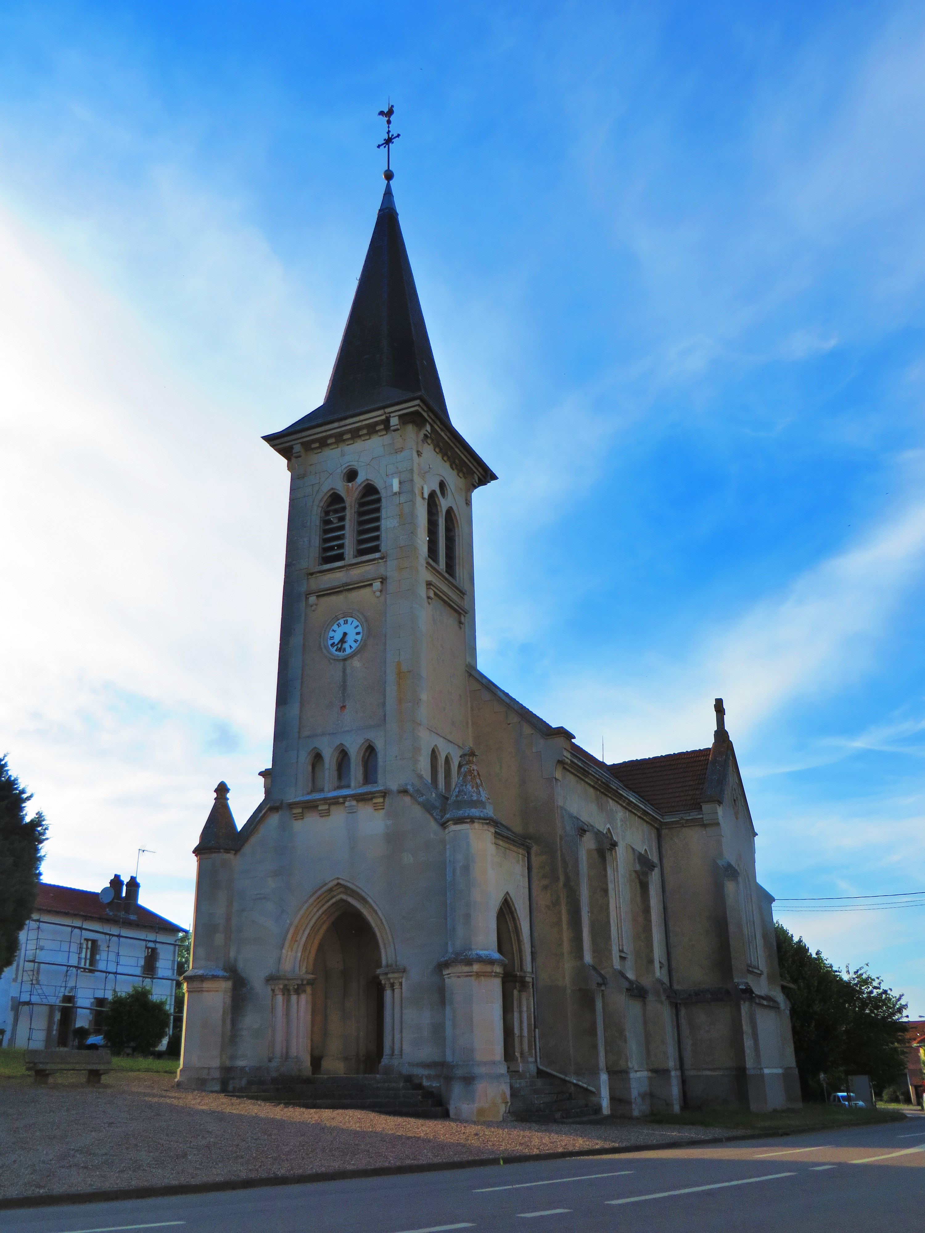 Port-sur-Seille église de l'Assomption